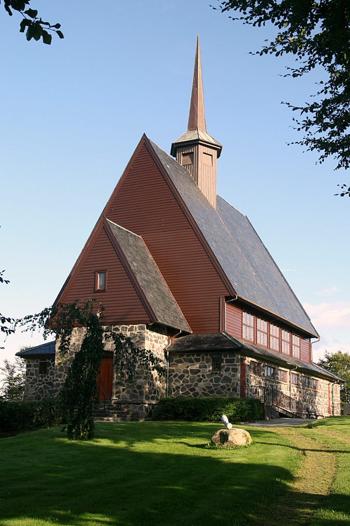 Julebygda kapell, Sandnes Norway